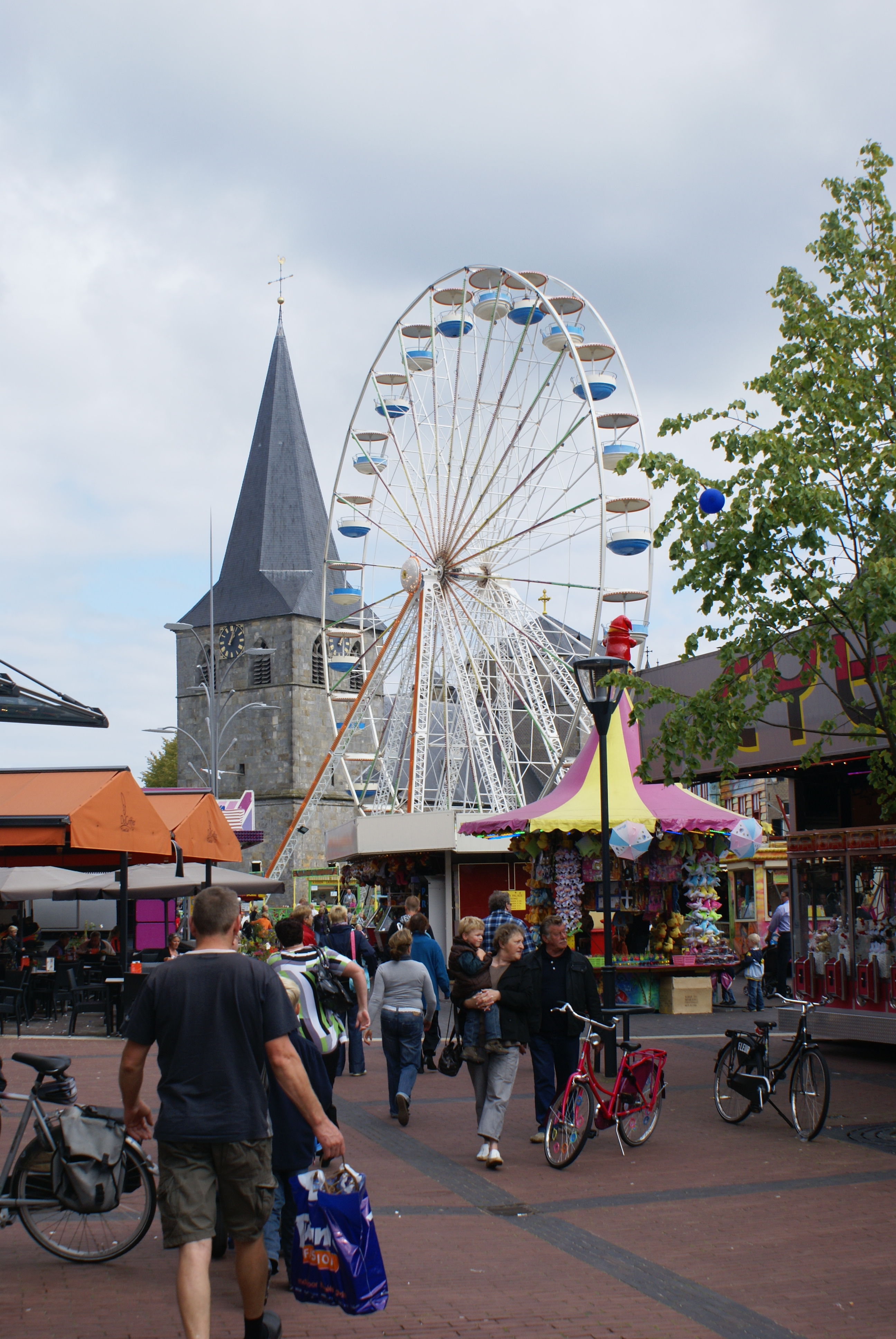 Kirmes in Denekamp, im Hintergrund die Sint Nicolaaskerk